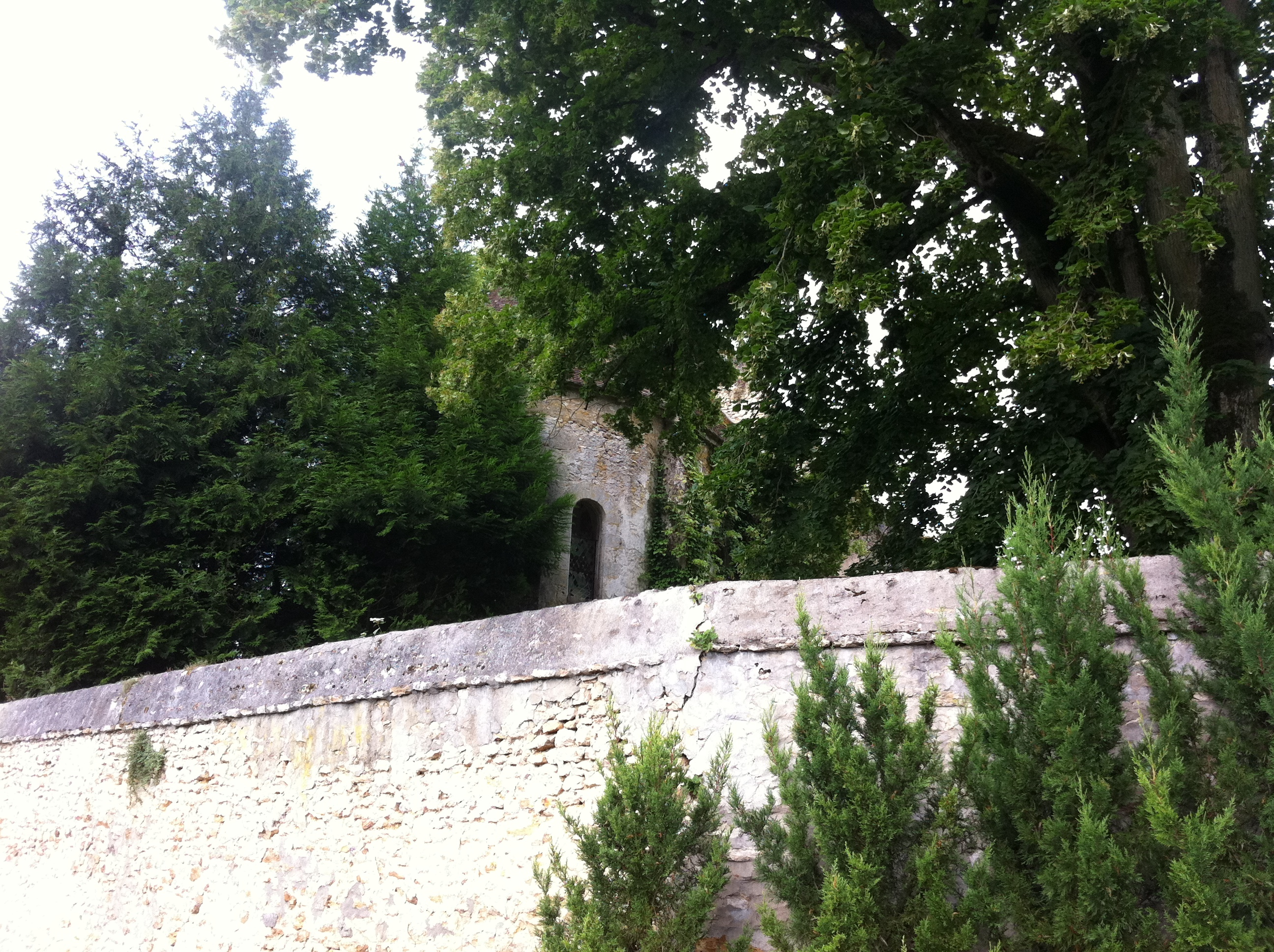 L'église ruinée de St-Hilaire Au sud d'Etampes(91)